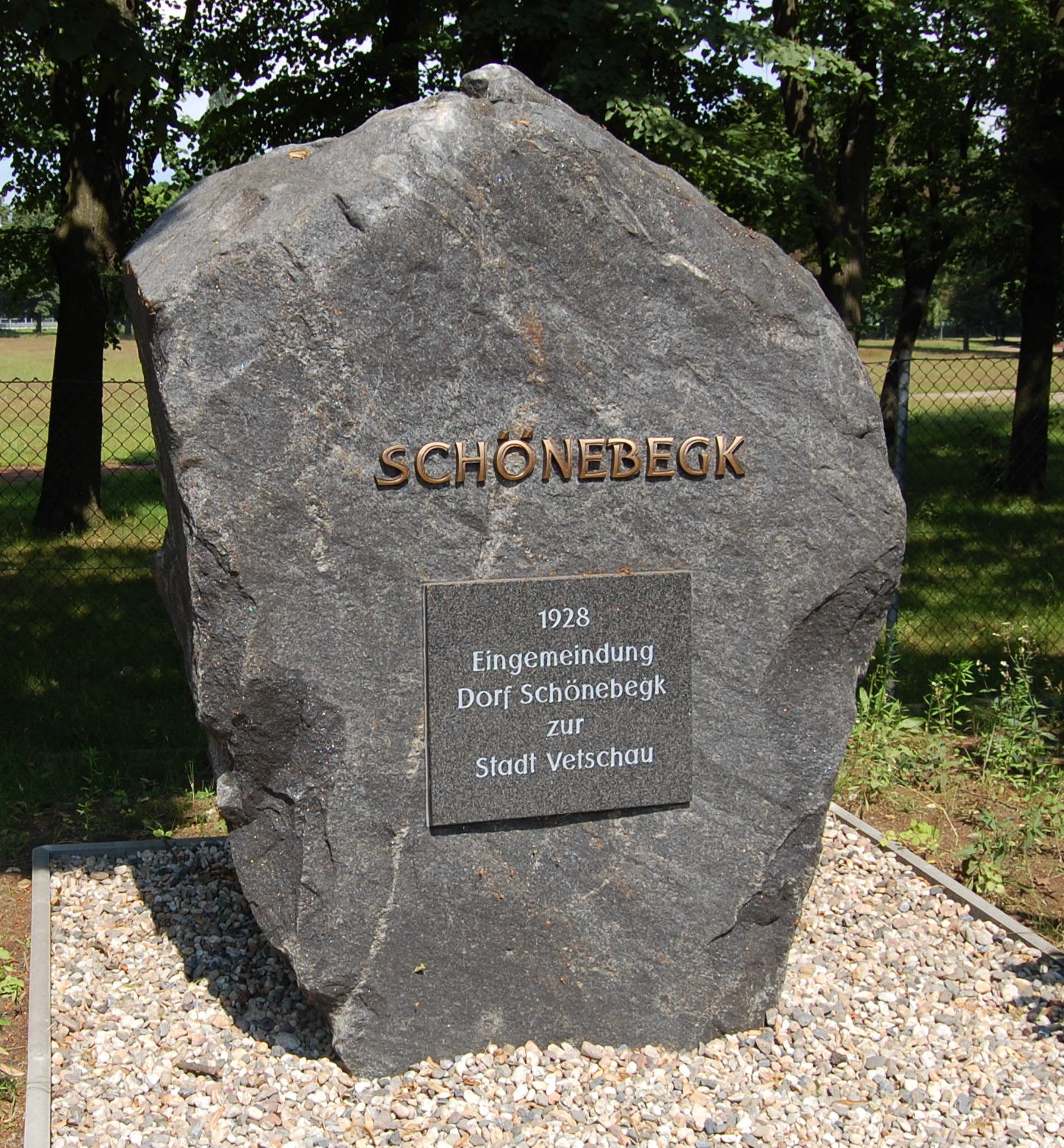 Gedenkstein an die Eingemeindung Schönebegks nach Vetschau, Friedrich-Ludwig-Jahn-Str. Vetschau